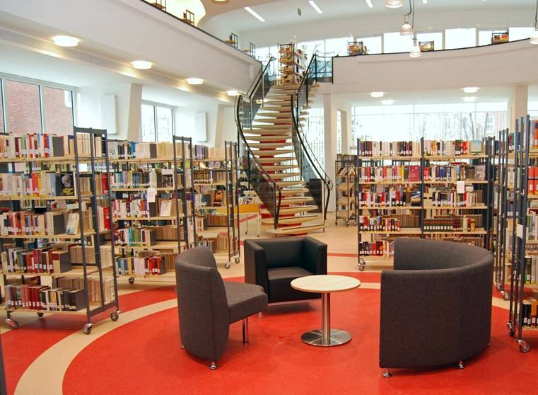 Blick in die "neue" Stadtbücherei Wilhelmshaven